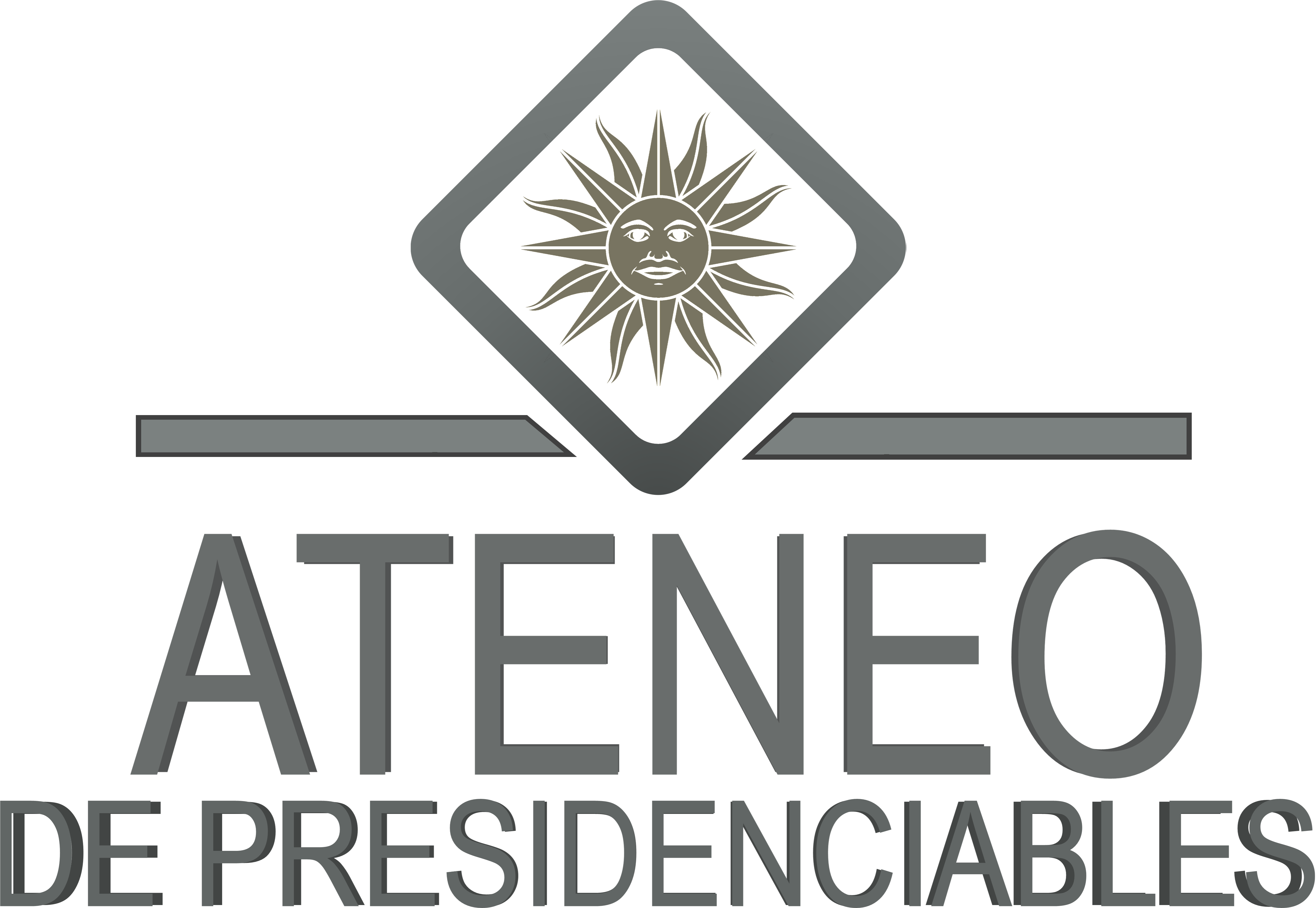 Logo del Ateneo de presidenciables. Imagen no oficial, de uso representativo